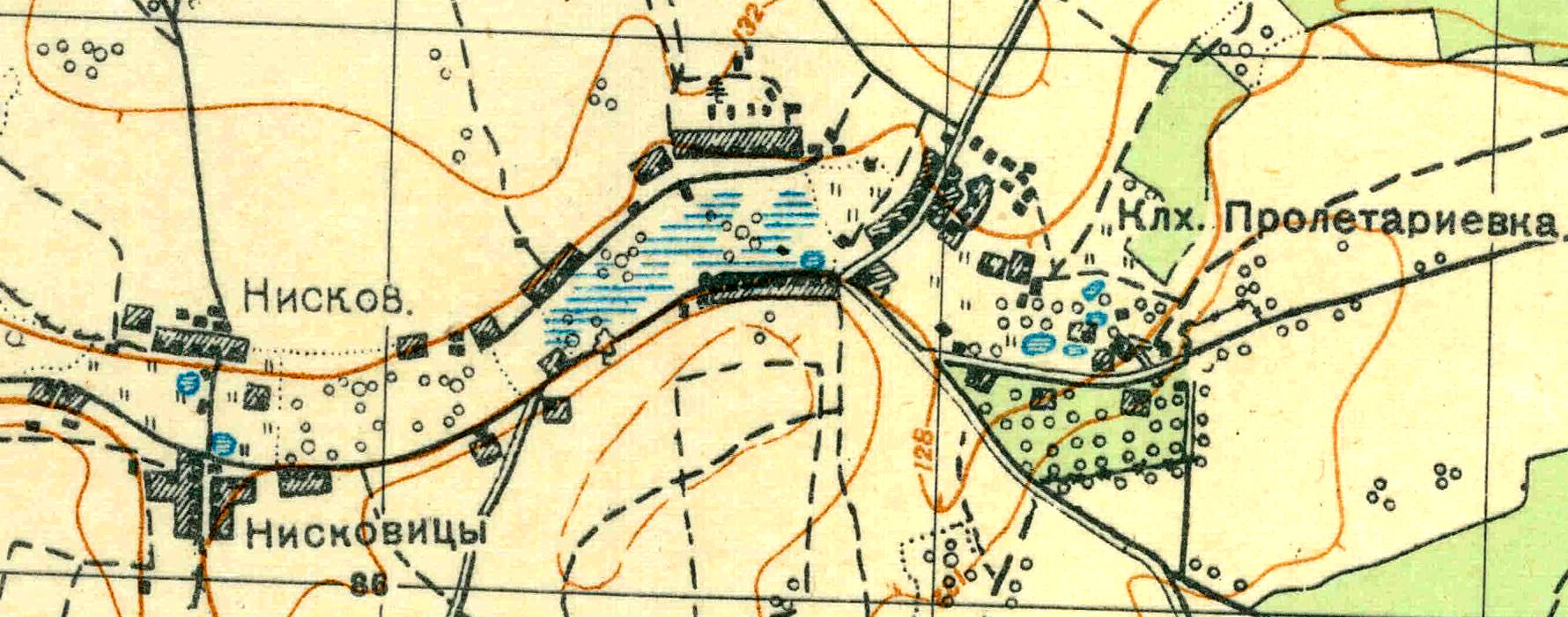 Топографическая карта Ленинградской области, квадрат О-35-24-А-б (Витино), деревня Старые Низковицы